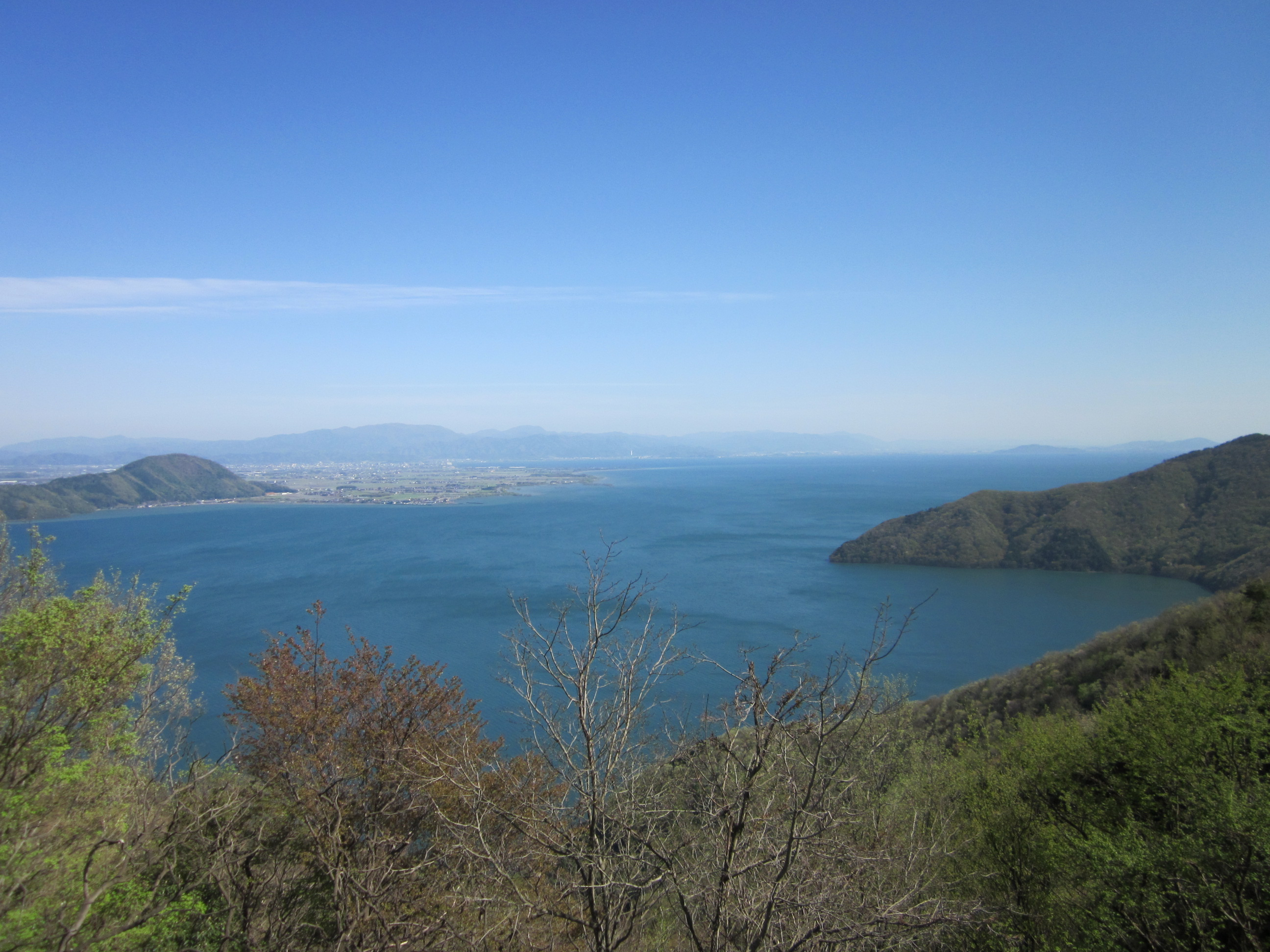 奥琵琶湖パークウェイからの眺望。現滋賀県道512号葛籠尾崎塩津線。